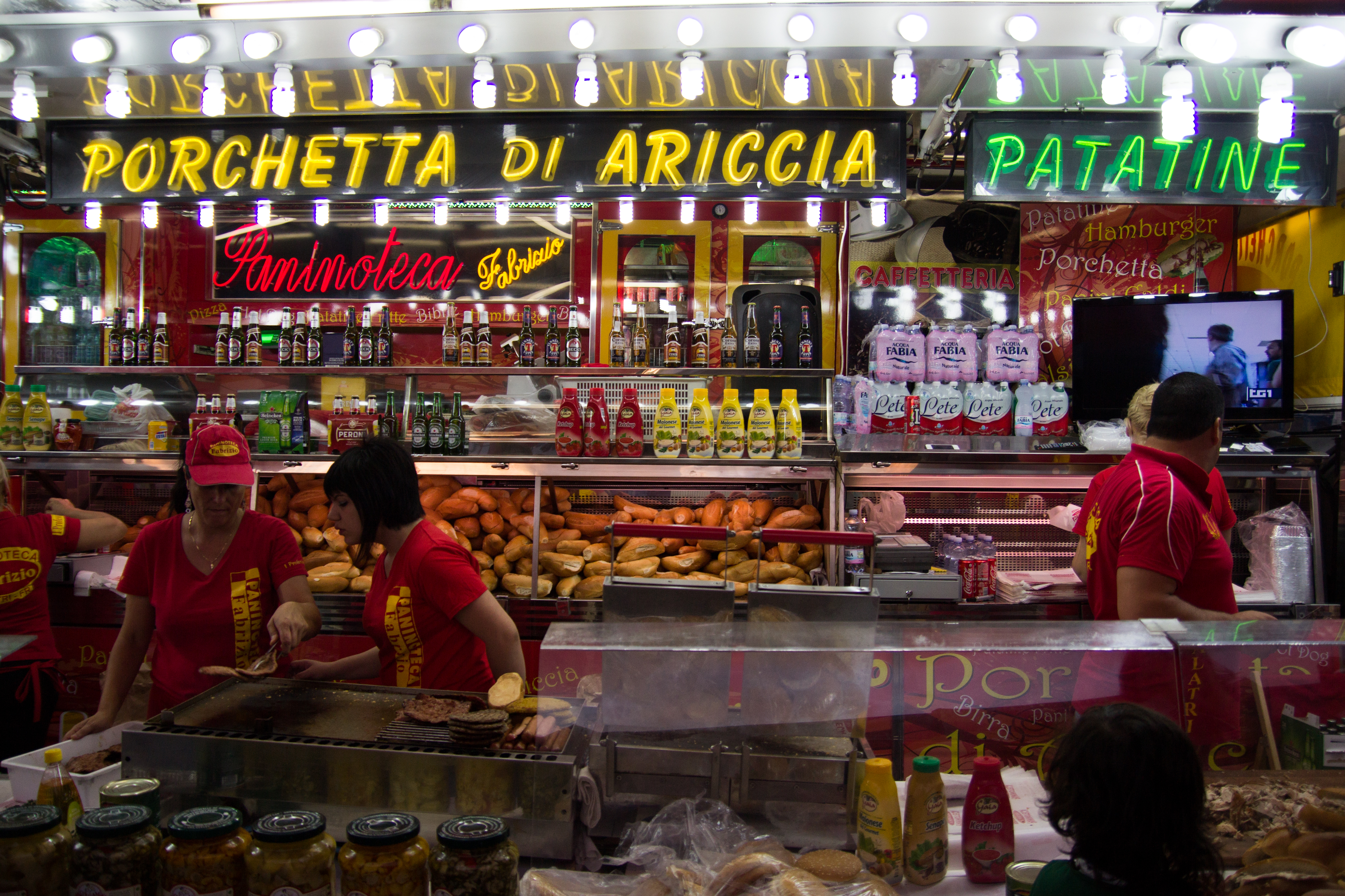 Paninoteca che vende della porchetta di Ariccia – Italia.